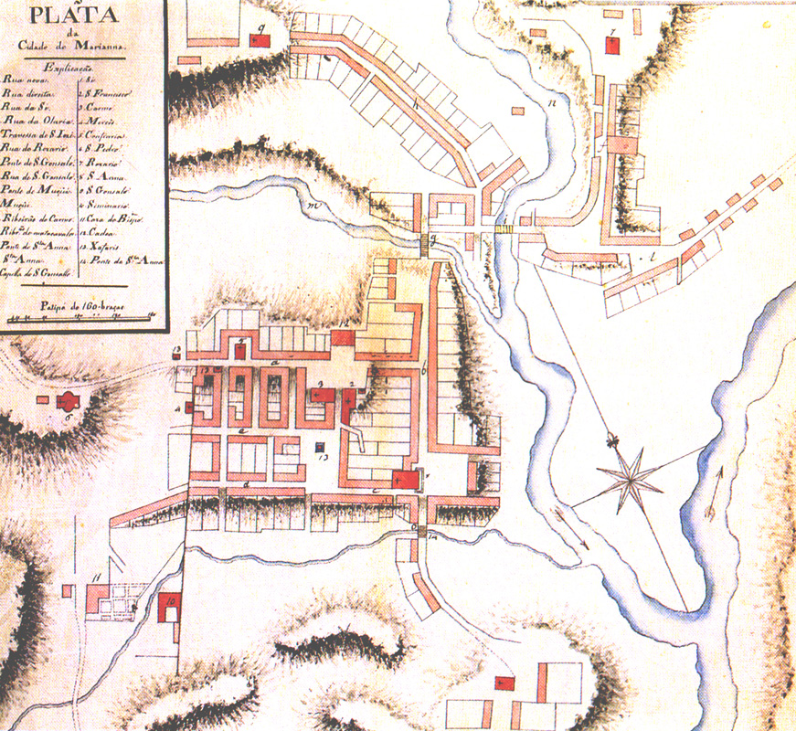 Planta da cidade de Mariana (segunda metade do século XVIII)